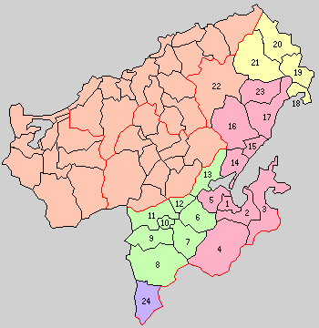 京都府与謝郡の町村制時点の町村。